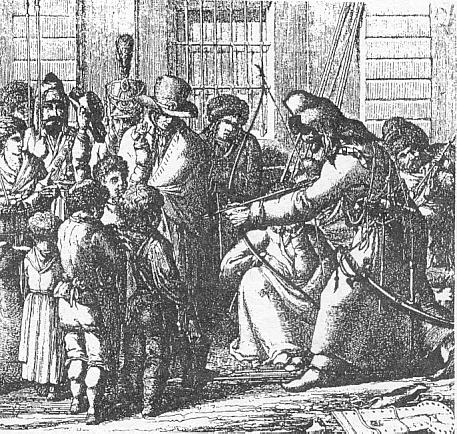 Baschkirischer Bogenschütze. Die deutsche Gravüre 18.04.1814